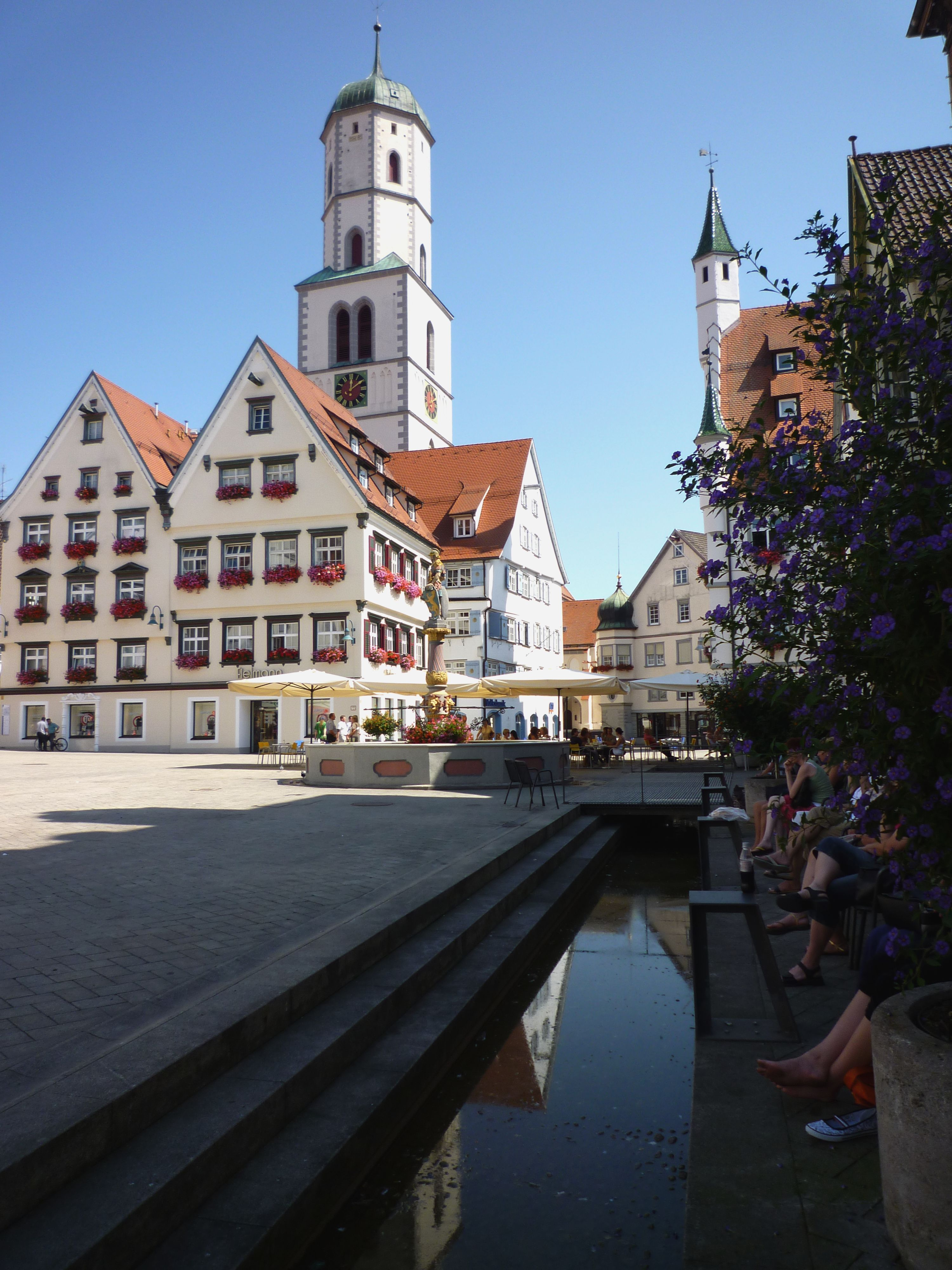 Biberach - Marktplatz mit Martinskirche